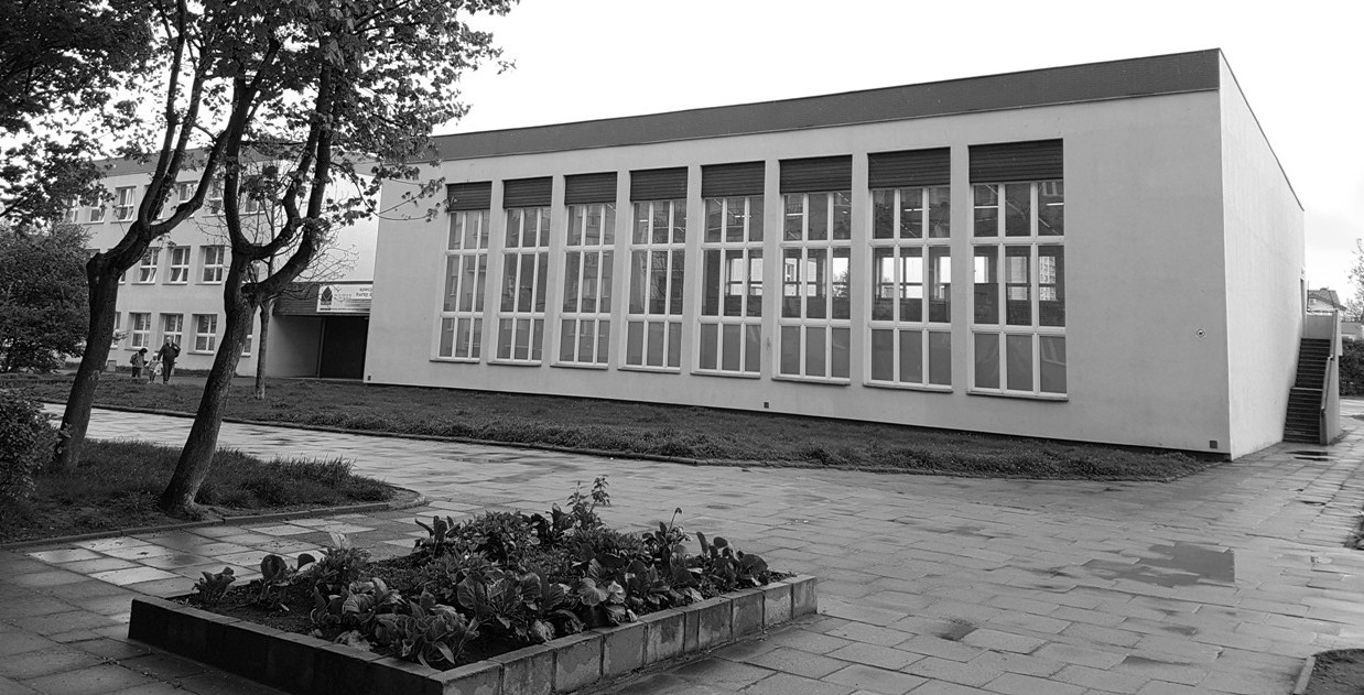 Spójnia w latach 70/80. w tej hali gimnastycznej Szkoły Podstawowej nr 12 na Zachodzie rozgrywała mecze